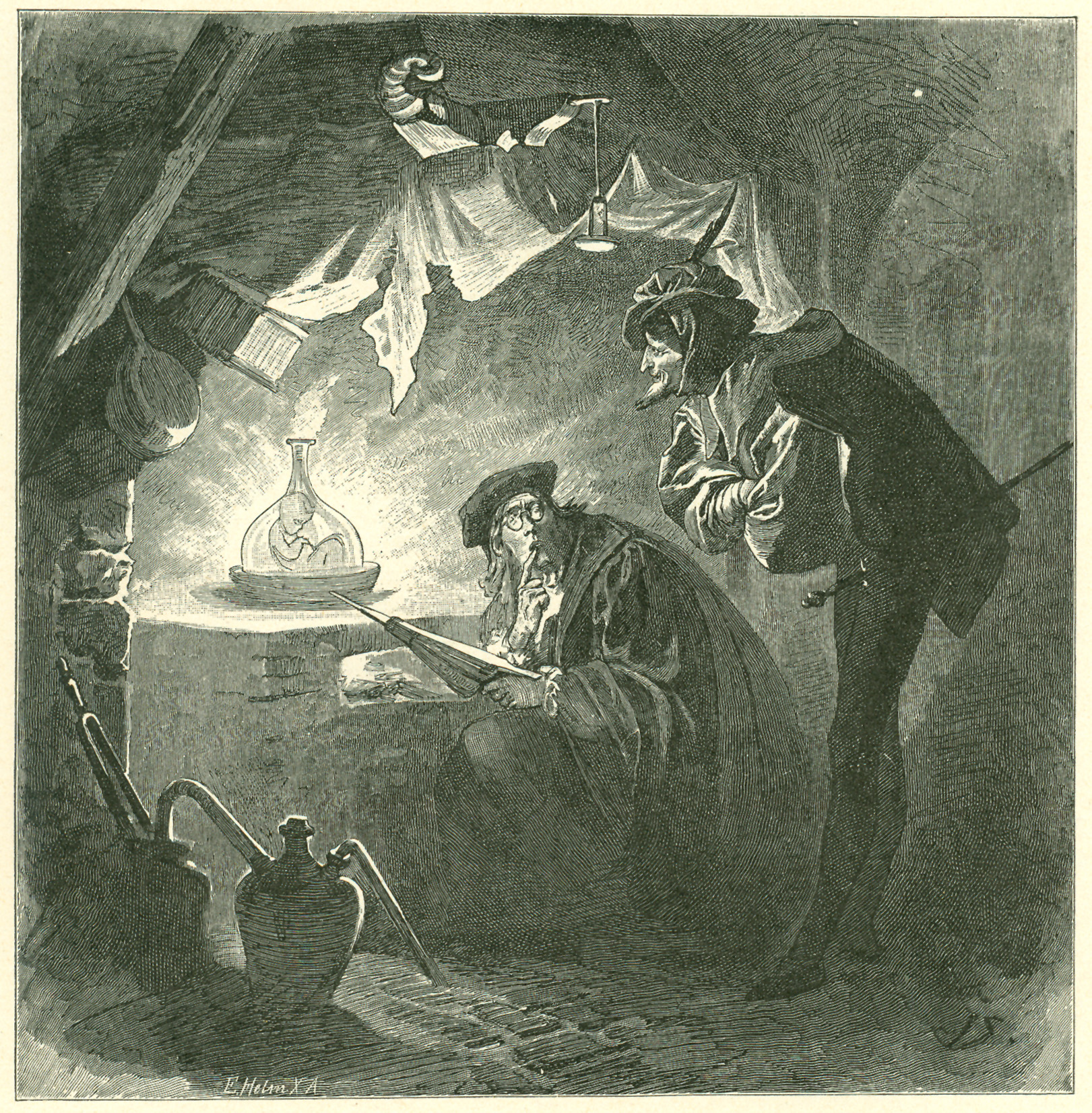 Homunkulus in der Phiole. Famulus Wagner und Mephistopheles. Illustration zu Johann Wolfgang von Goethe, Faust. Zweiter Teil, Zweiter Akt, Laboratorium.